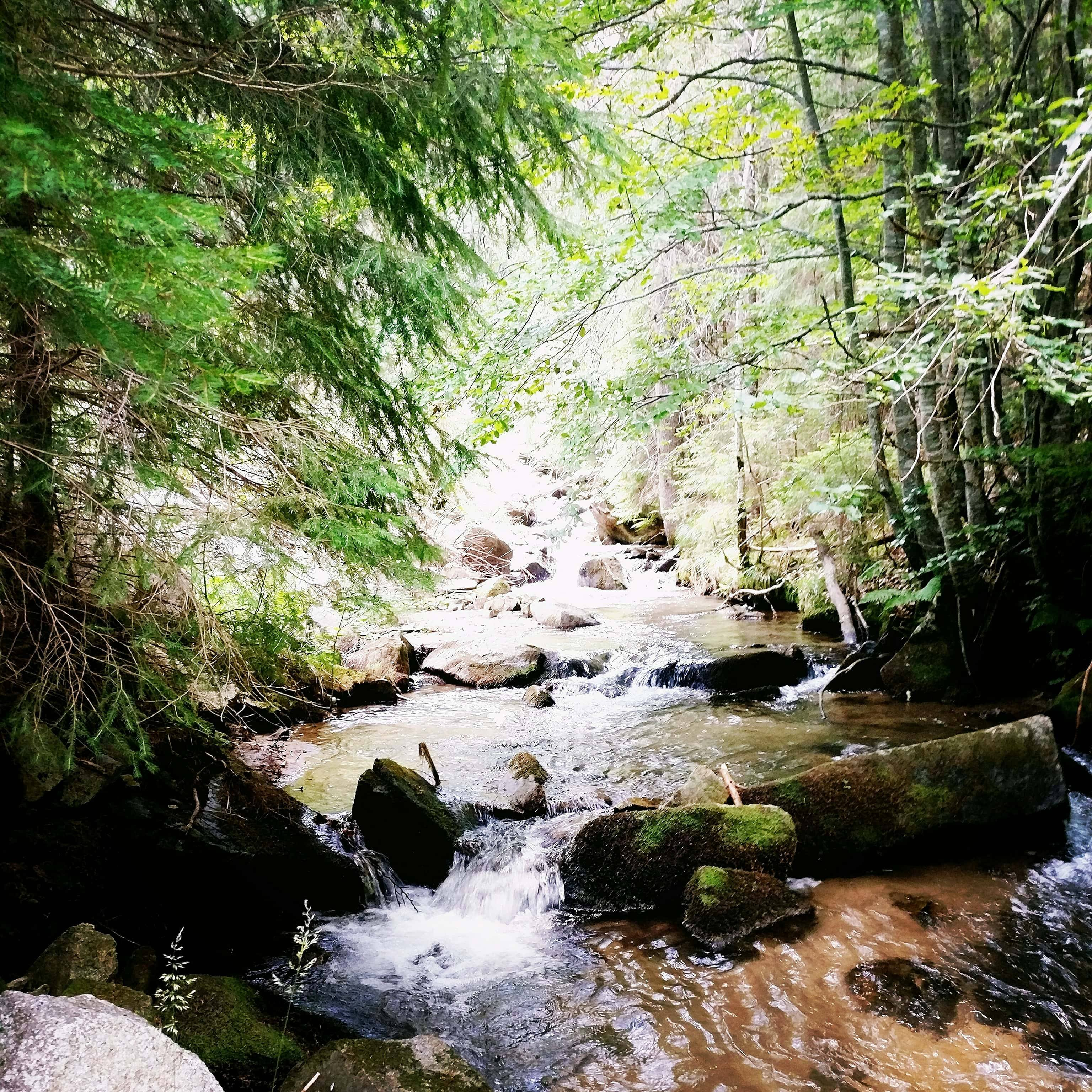 αυτή η φωτογραφία απεικονίζει το πανέμορφο δάσος της Ελατιάς με τις μικρές και μεγάλες εκπλήξεις του This is a photography of Natura 2000 protected area with ID GR1140003